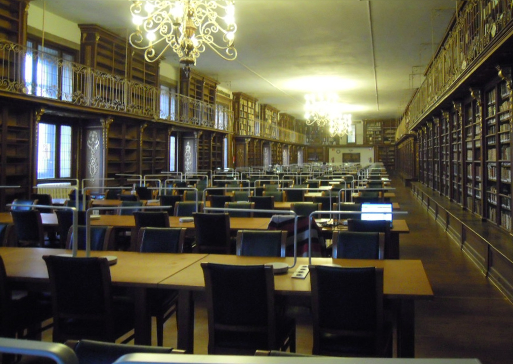 Biblioteca da Facultade de Xeografía e Historia da Universidade de Santiago de Compostela